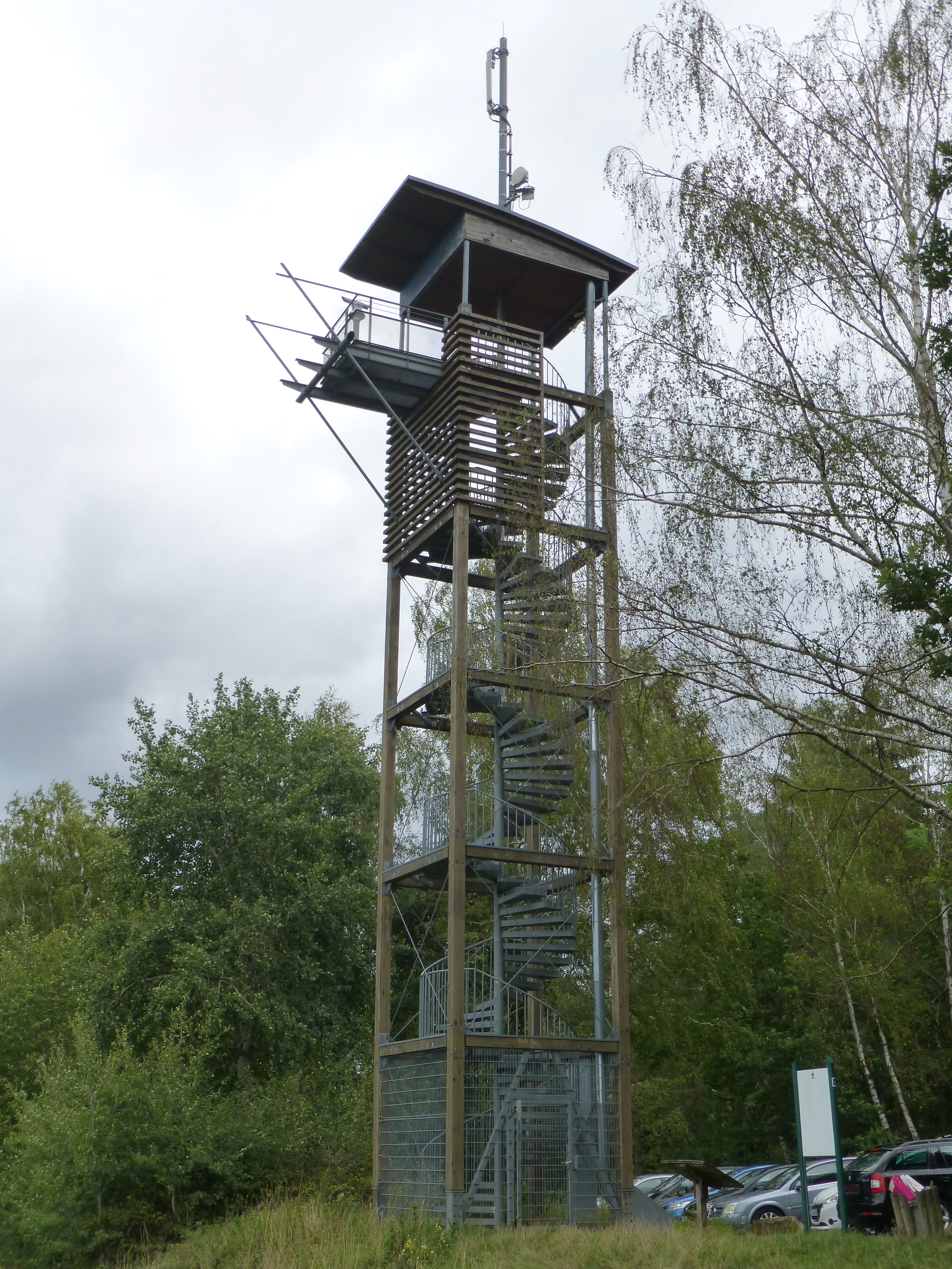 Rodfeldturm